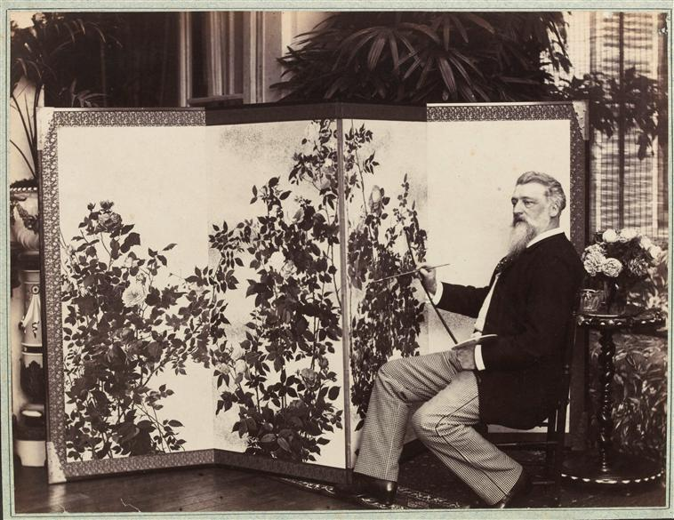 Claudius Popelin assis, et peignant.